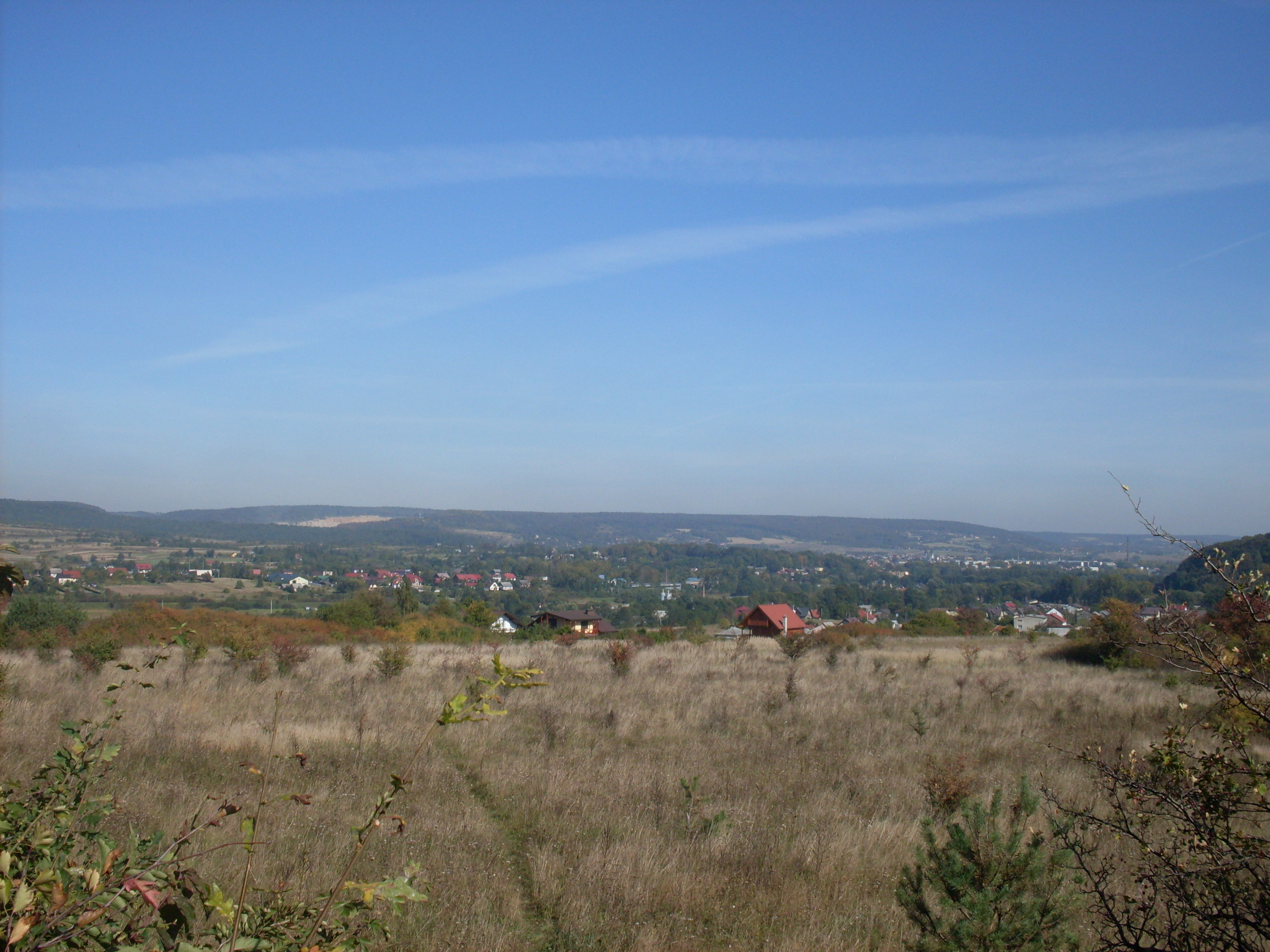 Widok zw wzgórza Skałki w str. Krzeszowic